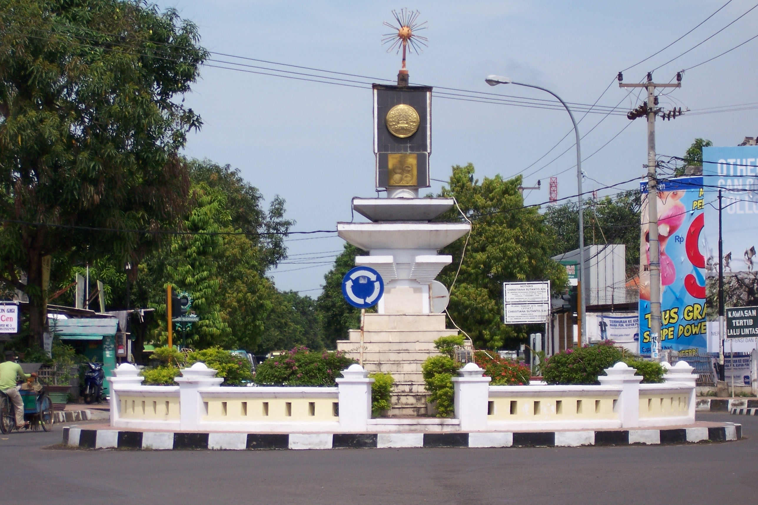 Bunderan Jam Indramayu